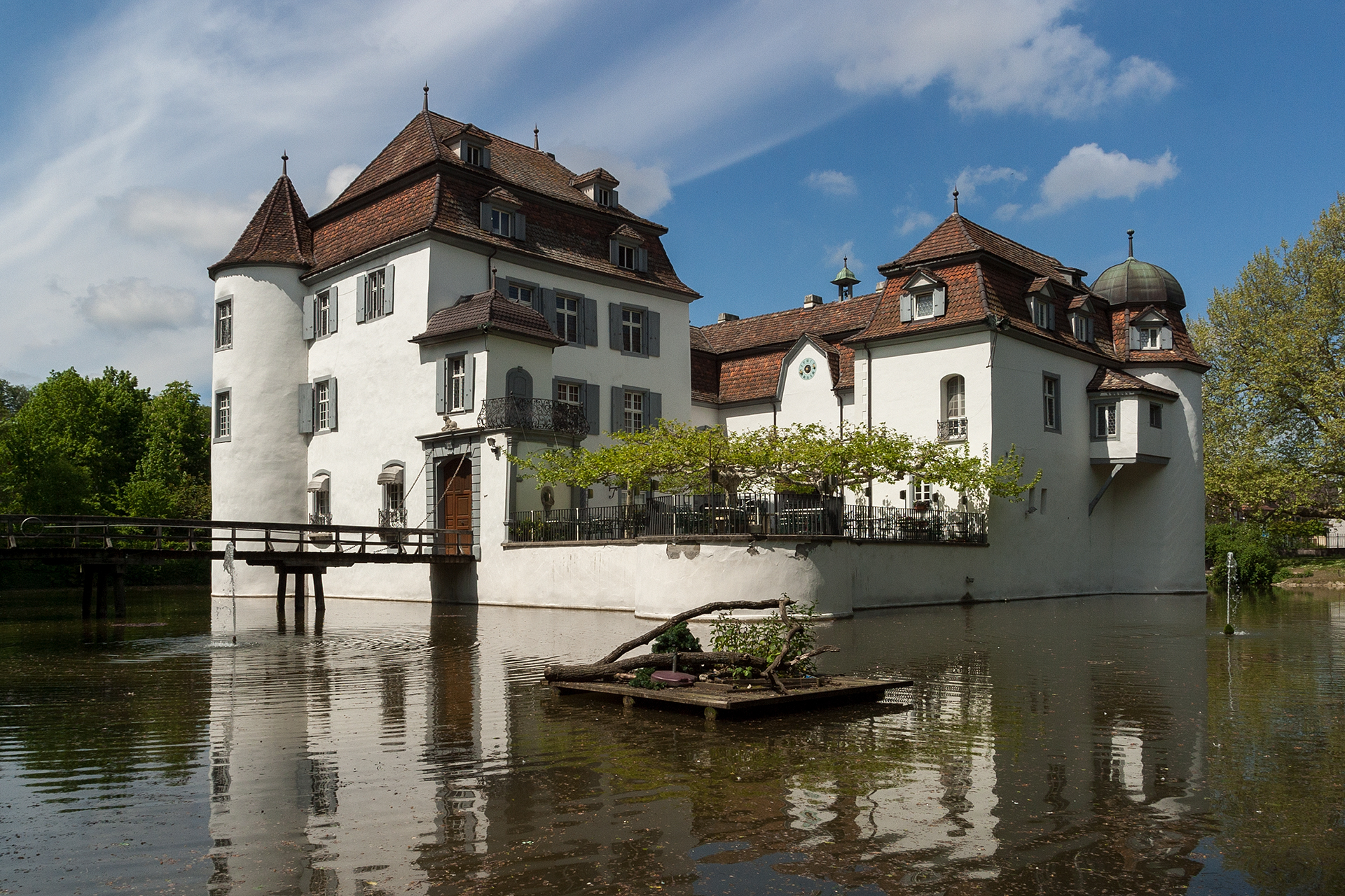 Weiherschloss Bottmingen (BL)